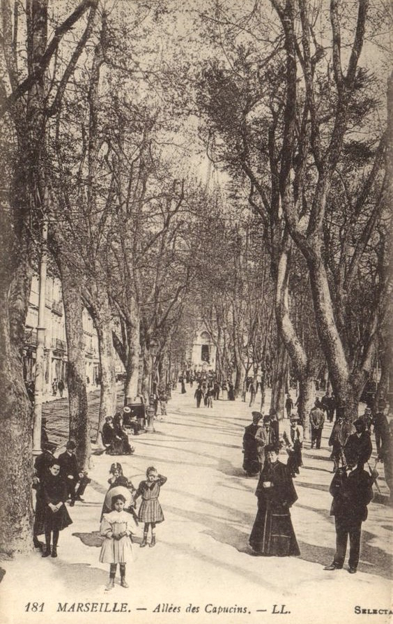 Marseille, Allée des Capucines, vers 1900. Carte postale ancienne.